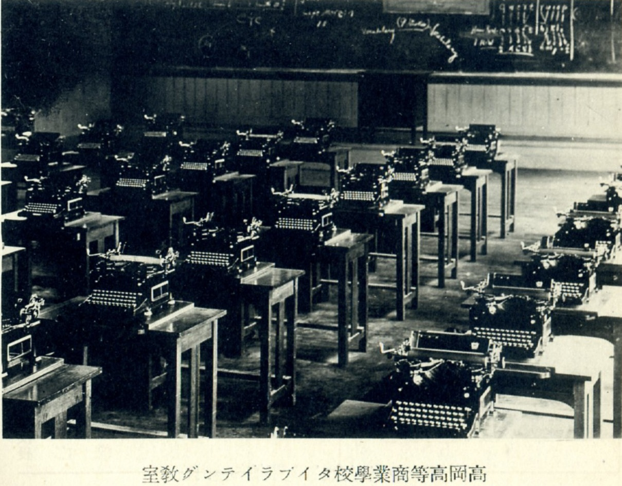 高岡高等商業学校タイプライテング教室